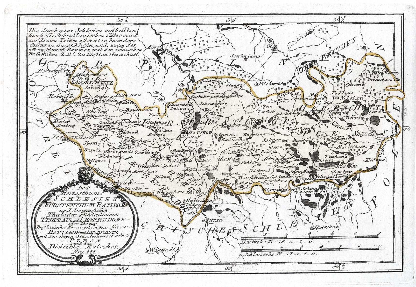 "Des Herzugthums Schlesien Fürstenthum Ratibor und die preussischen Theile der Fürstenthümer Troppau und Jägerndorf oder die zur Breslauischen Kammer gehörigen Kreise Ratibor und Leobschütz mit der freyen Standesherrschaft Pless und dem Distrikte Katscher". Alt kolorierten Kupferstich-Karte bei Reilly